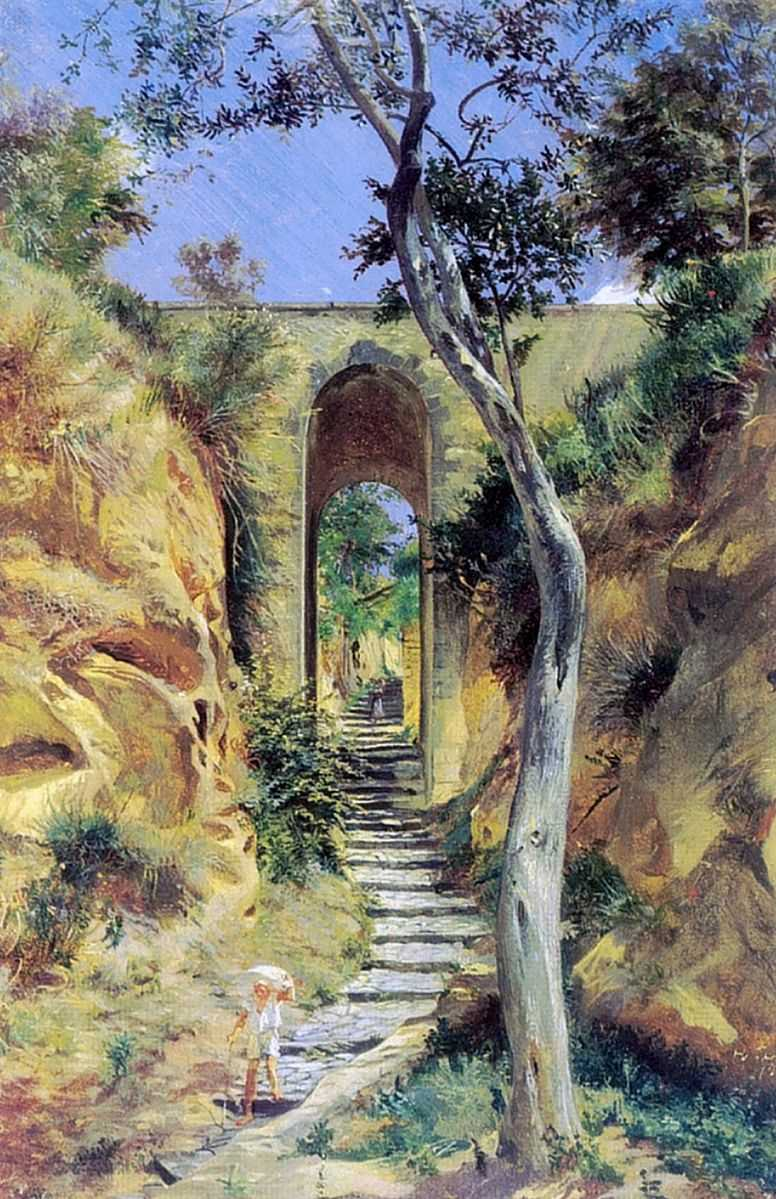 Ге Николай. Мост в Вико. 1858